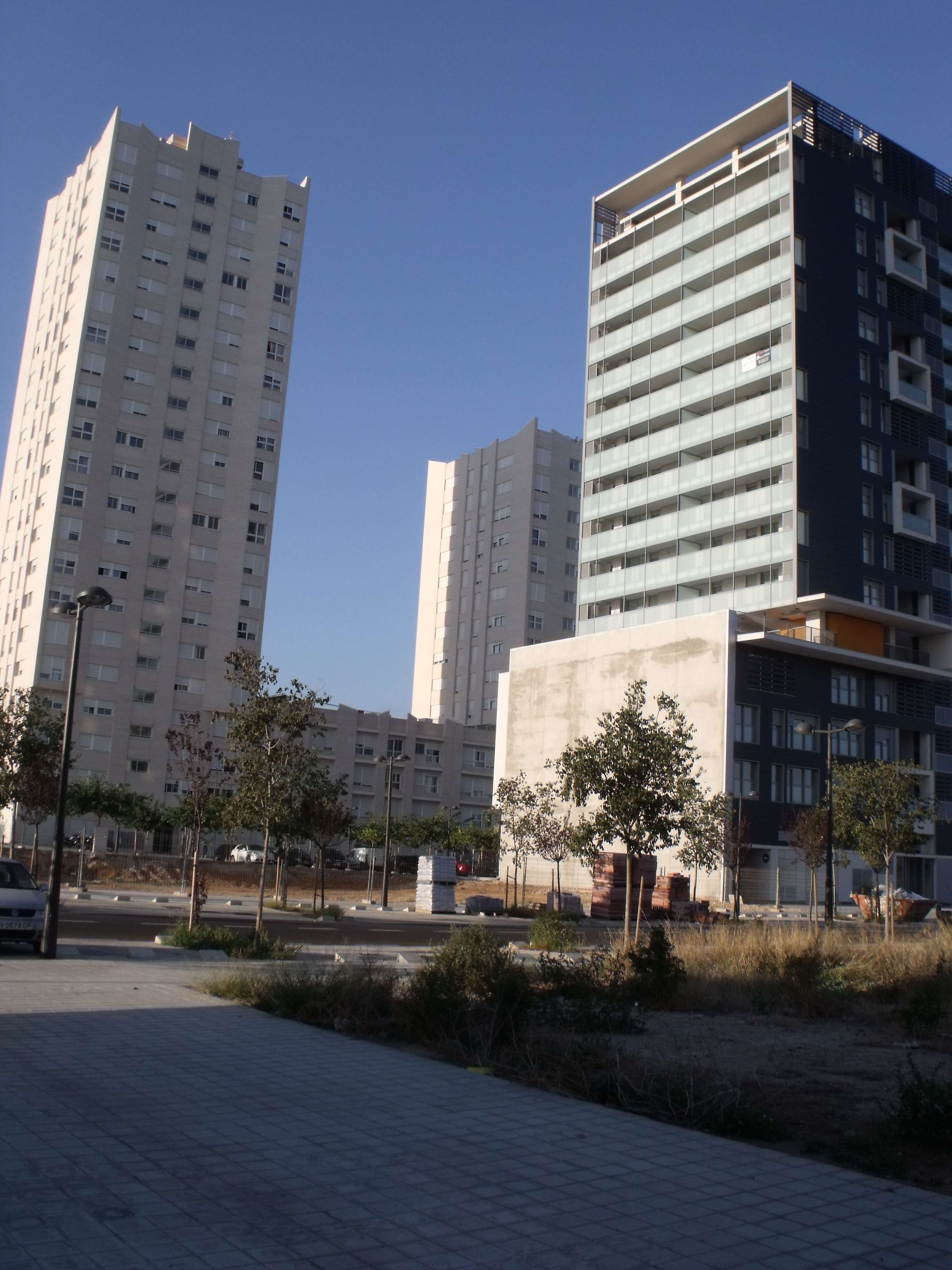 Sociòpolis